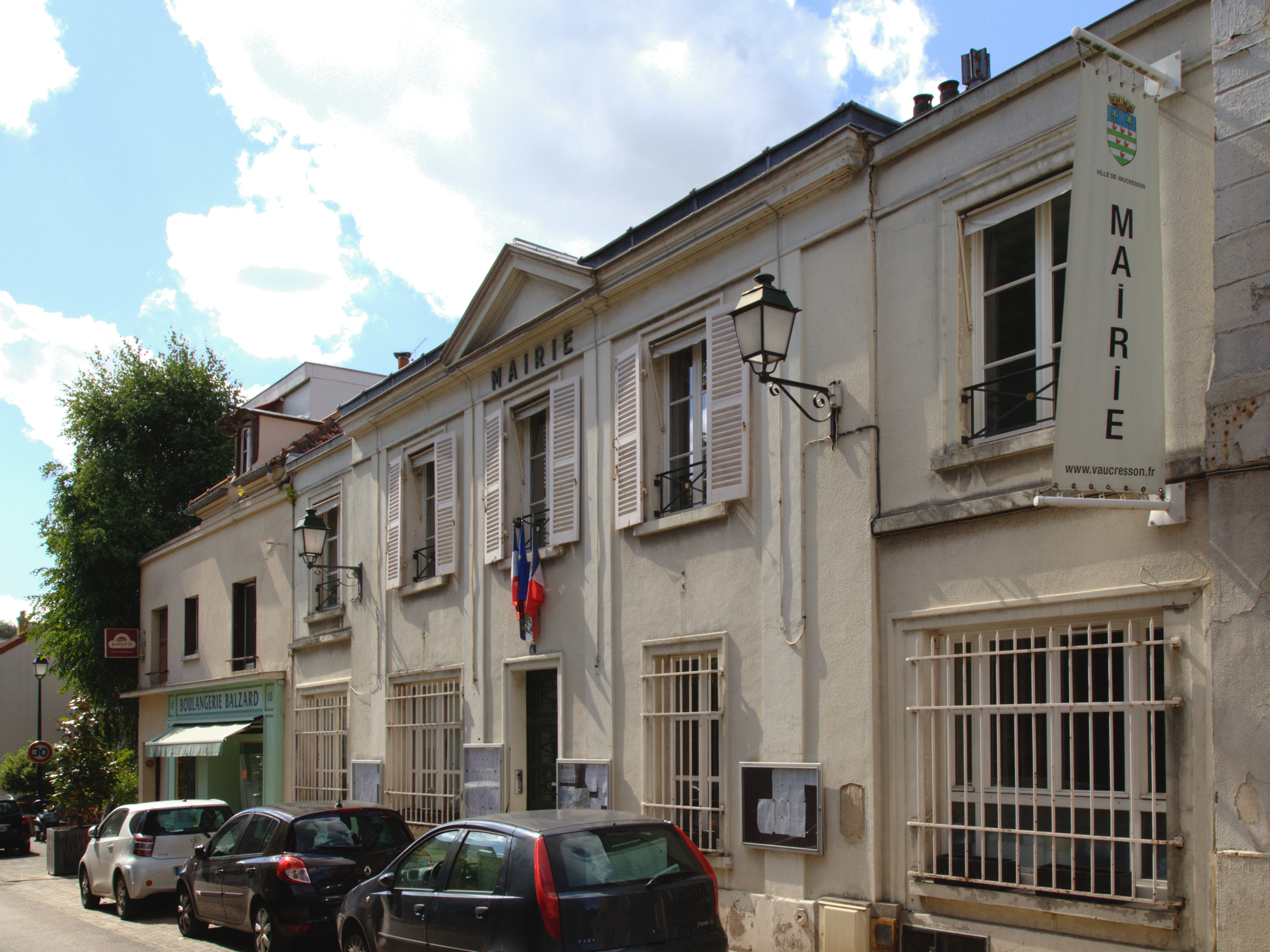 La mairie de Vaucresson (92)